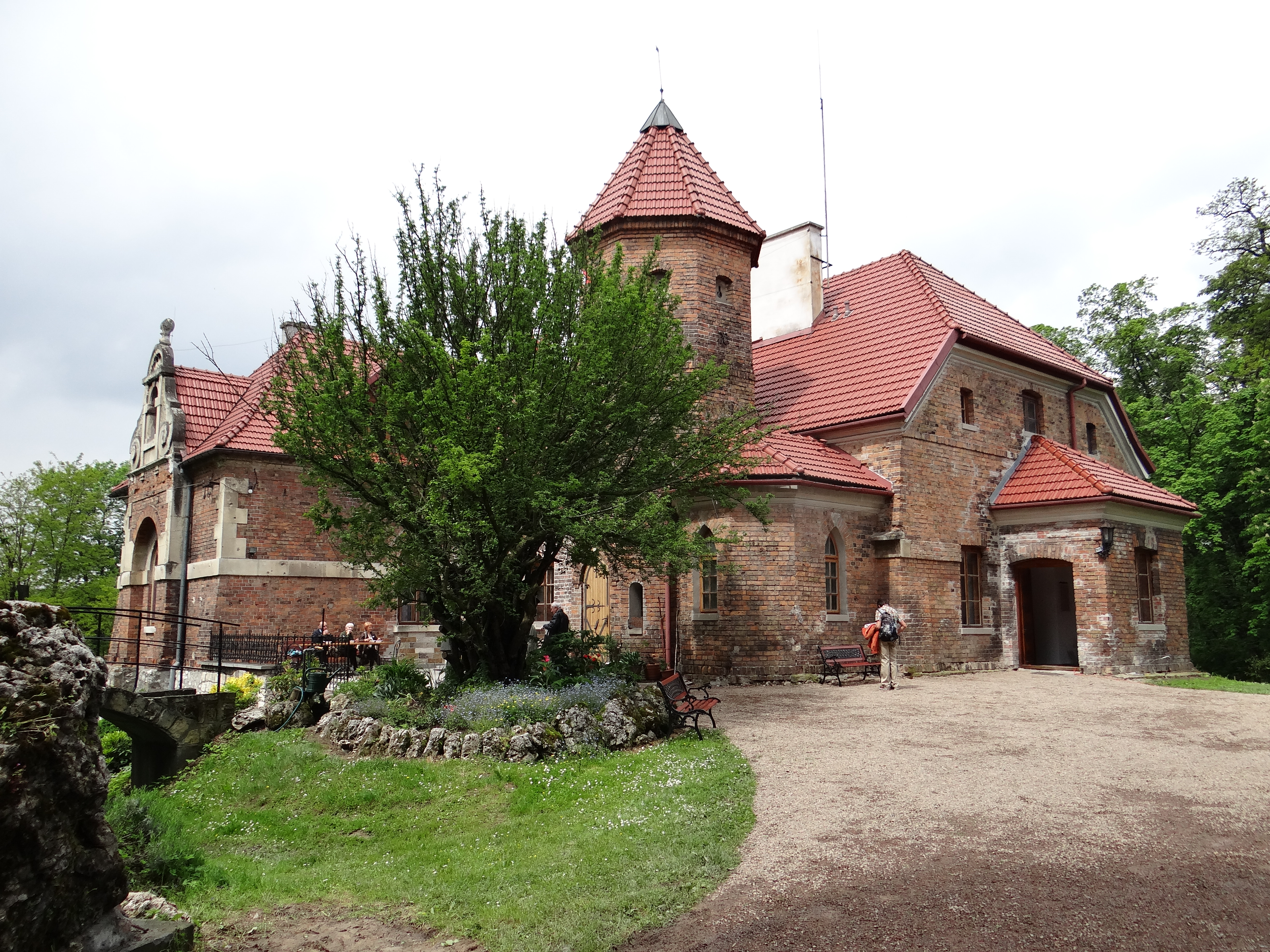 Michałowice, dwór, 1892- 1897